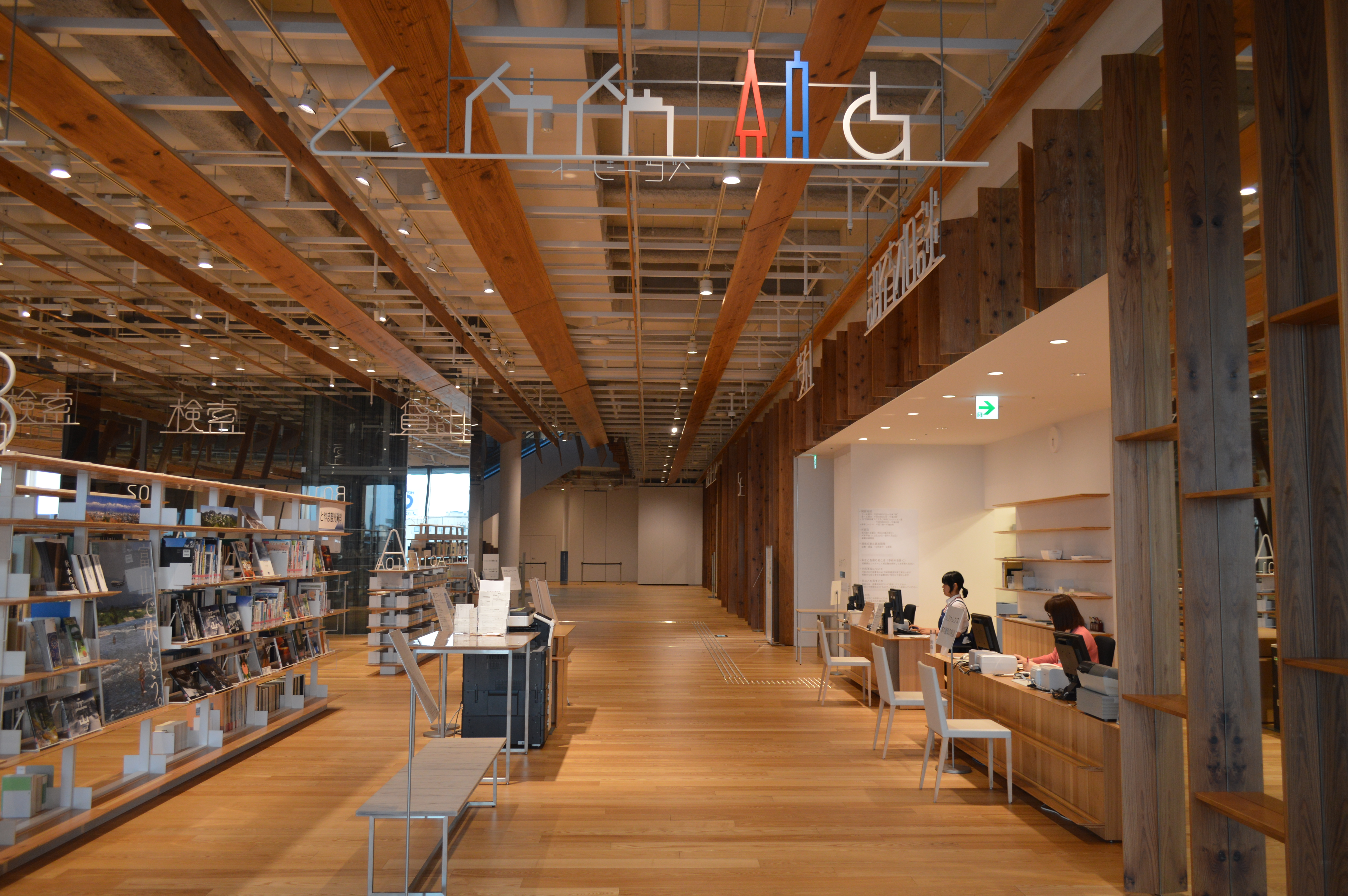 TOYAMAキラリ5階の富山市立図書館本館。